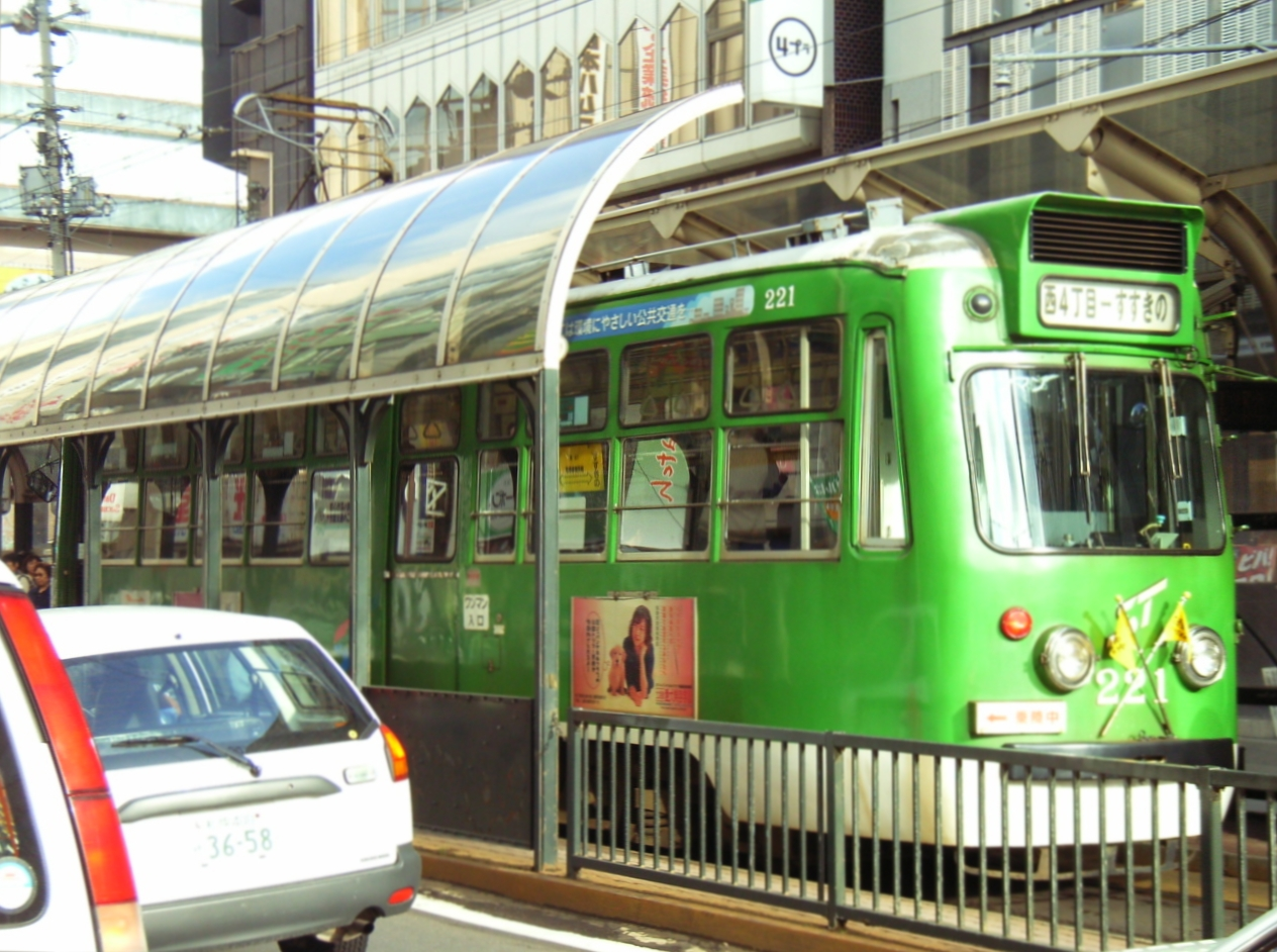 西4丁目停留場停車中のja:札幌市電221号車。